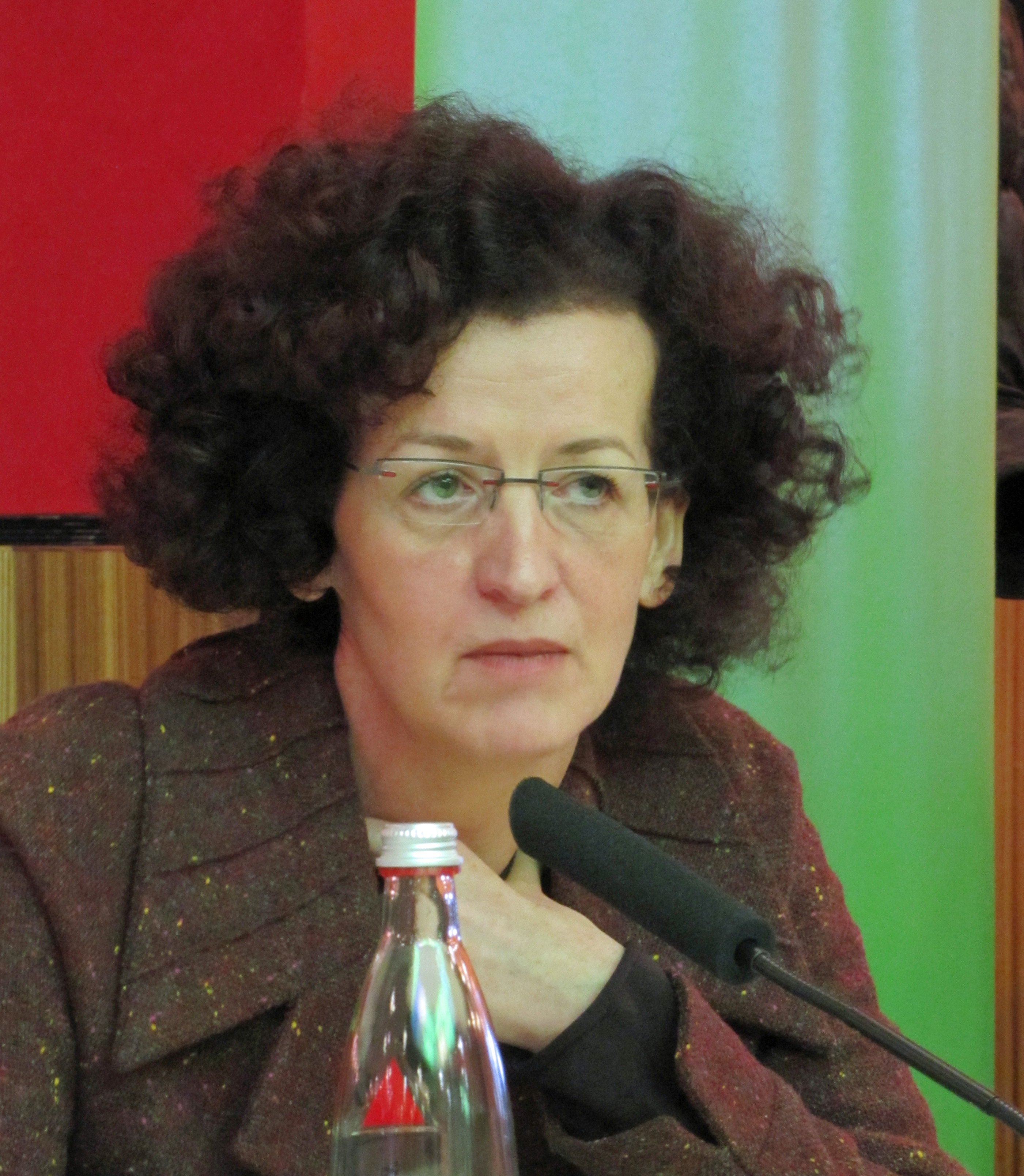 Maja Haderlap, 2012 in Ffm.